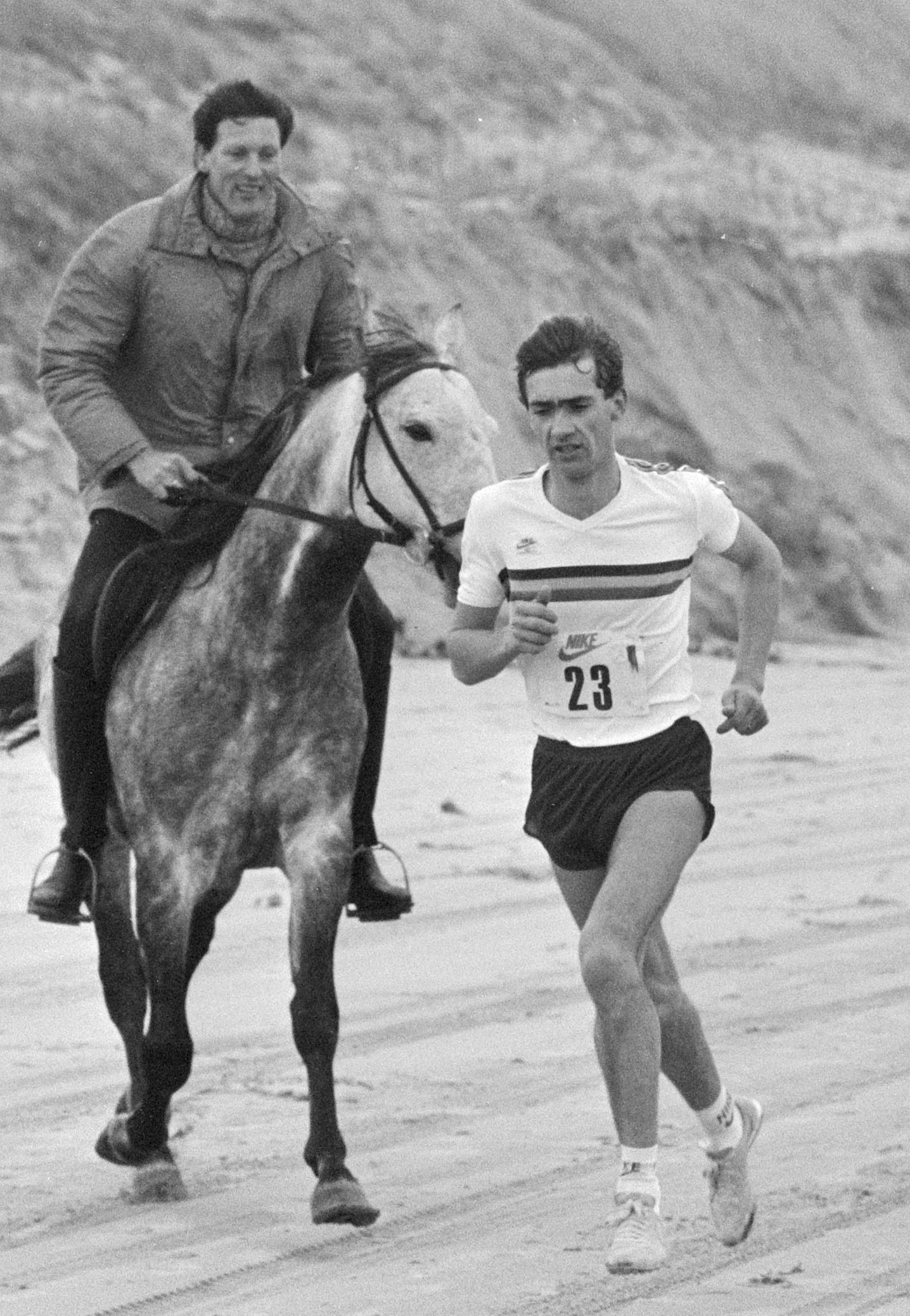 Halve marathon Egmond aan Zee ; winnaar Alex Hagelsteen in gezelschap in ruiter